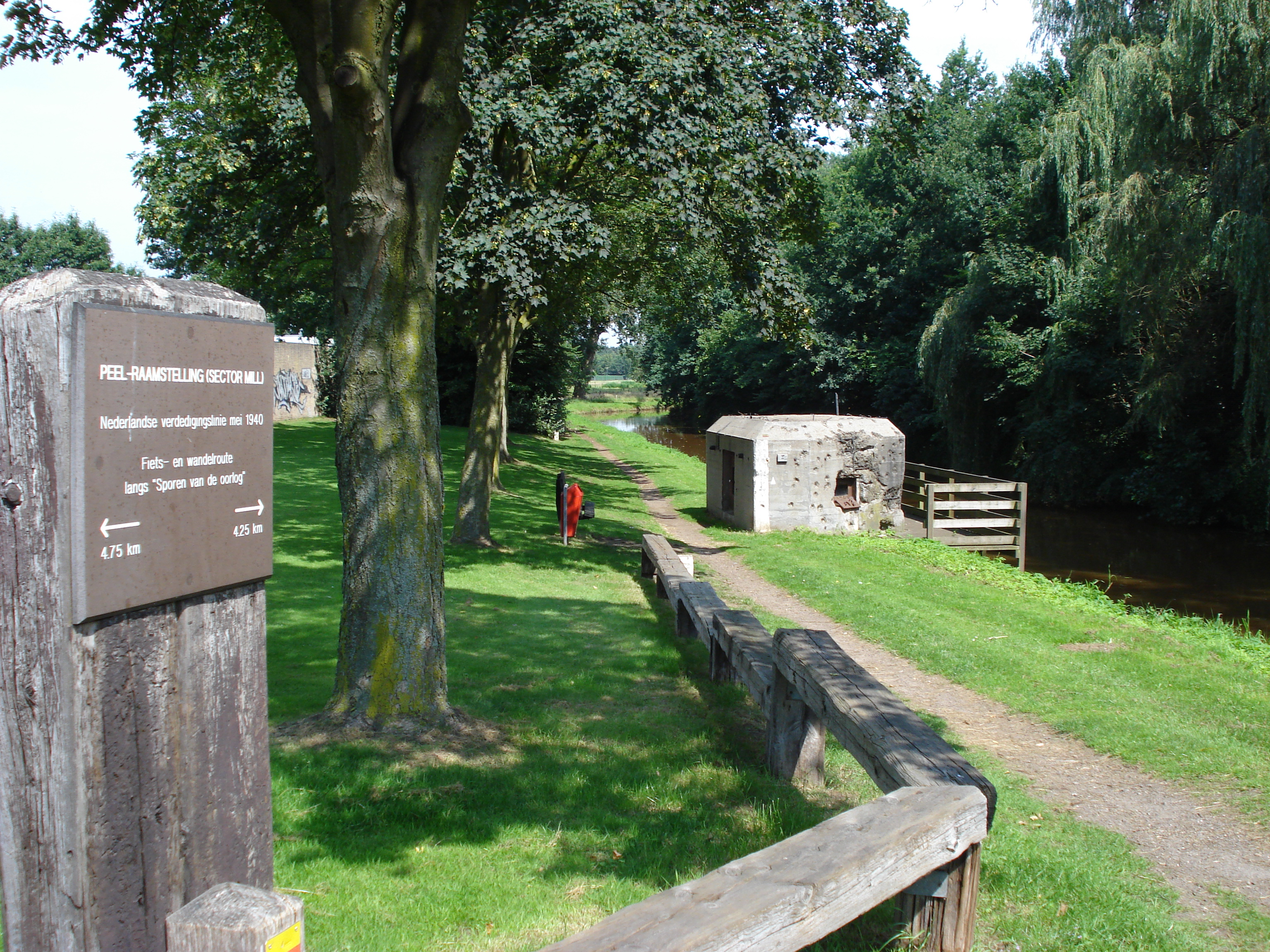 Mill, (North Brabant, NL) S-type casemate nr. 538 de la ligne de défense Peel-Raam au bord du "Defensiekanaal"